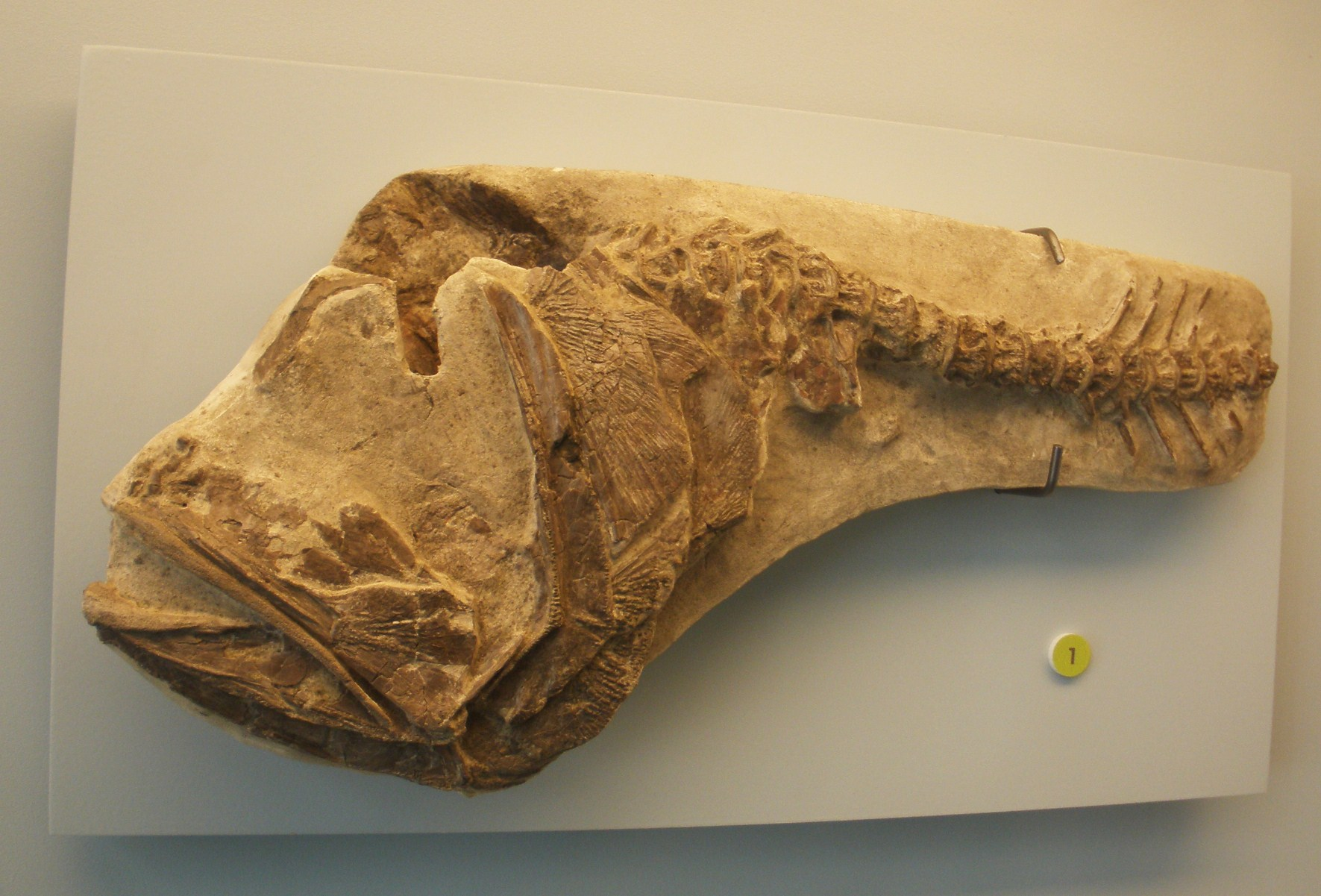 Fossil of Hoplopteryx, an extinct fish Took the photo at Musee d'Histoire Naturelle, Brussels